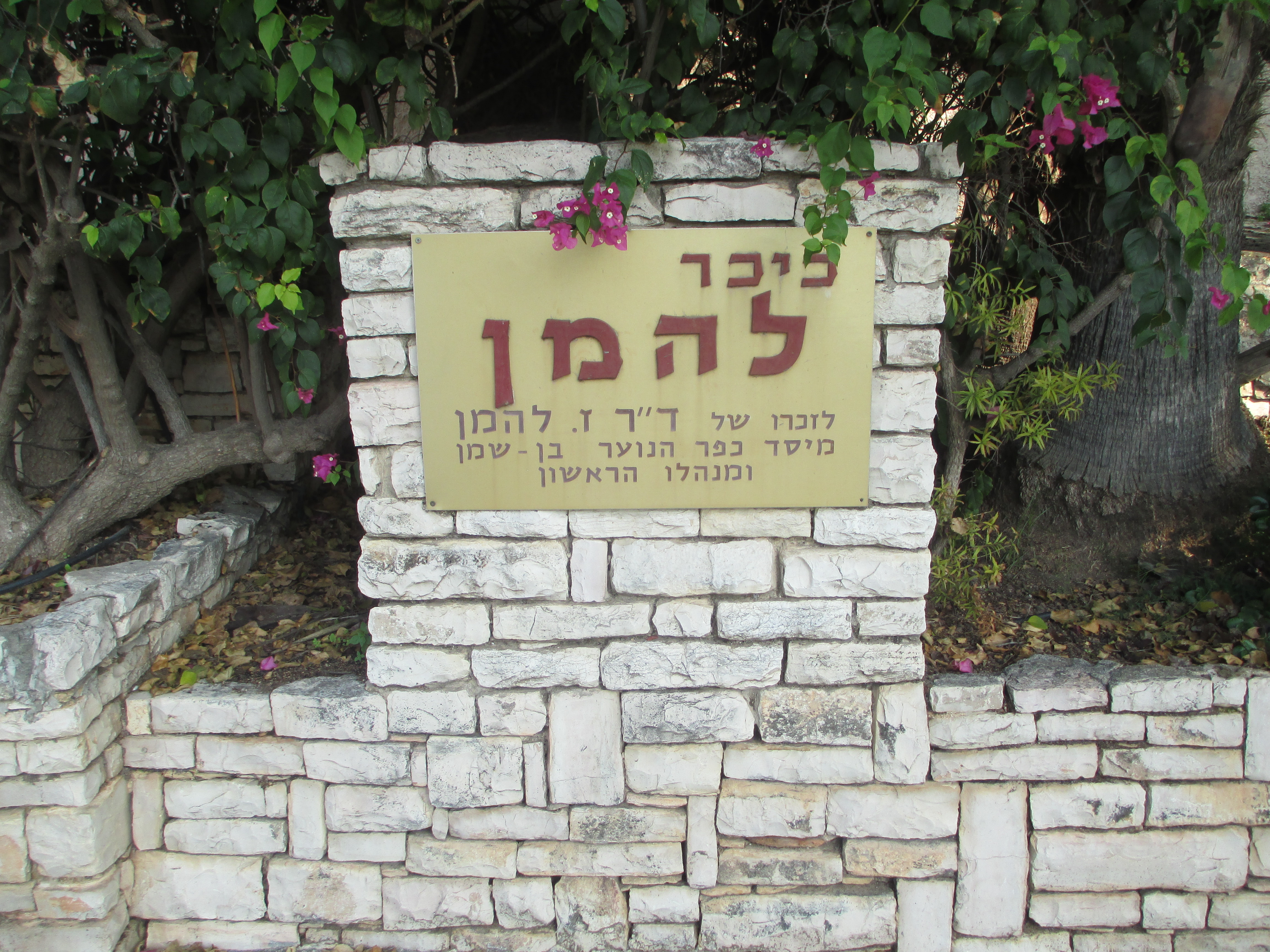 כיכר על שם ד"ר זיגפריד להמן בכפר הנוער בן שמן